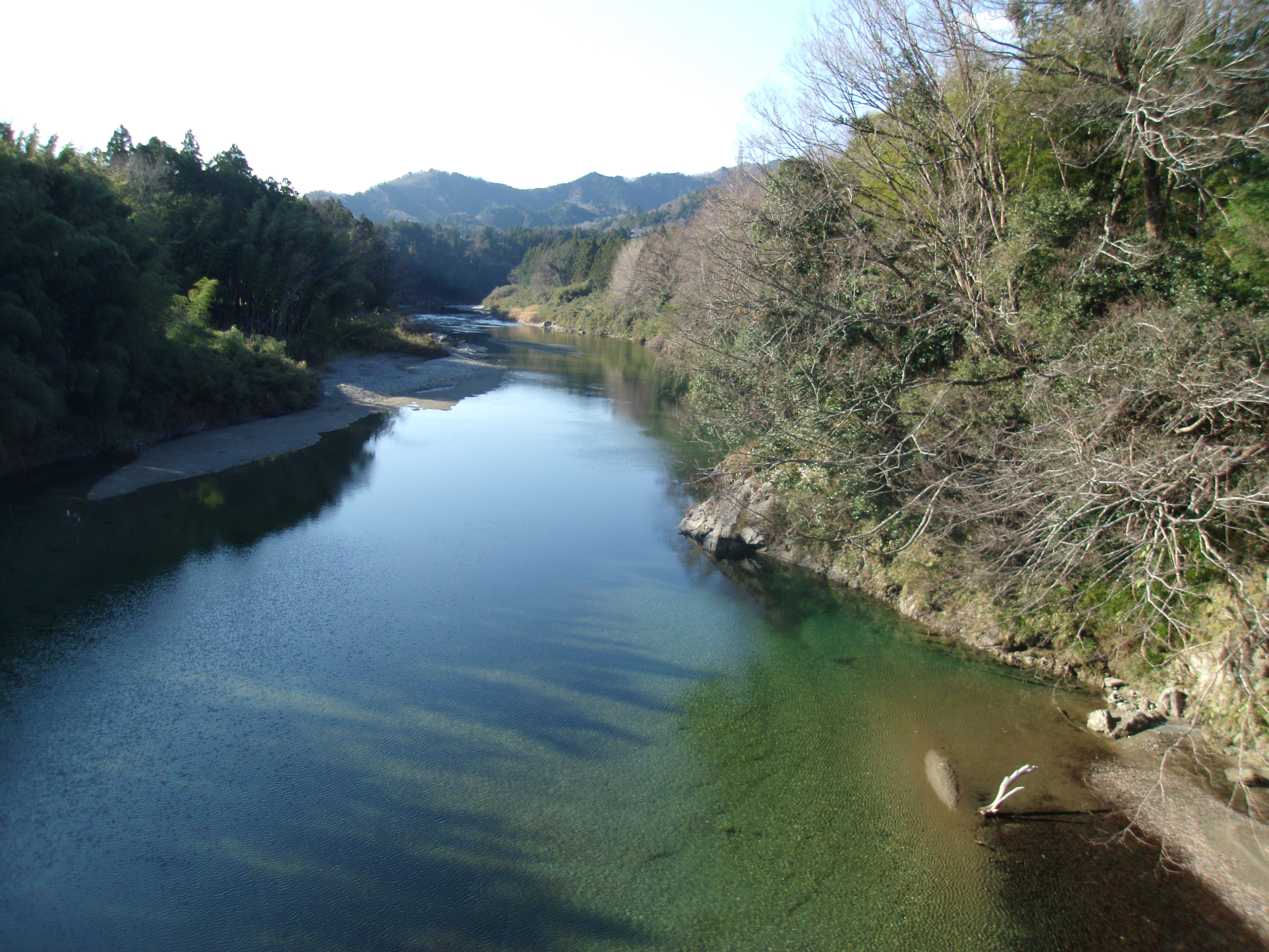 多気町を流れる櫛田川